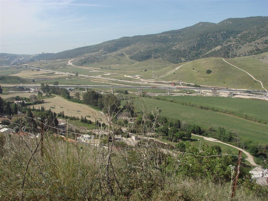 רכבת העמק החדשה - גשר הרכבת הגדול לייד קרית חרושת 1